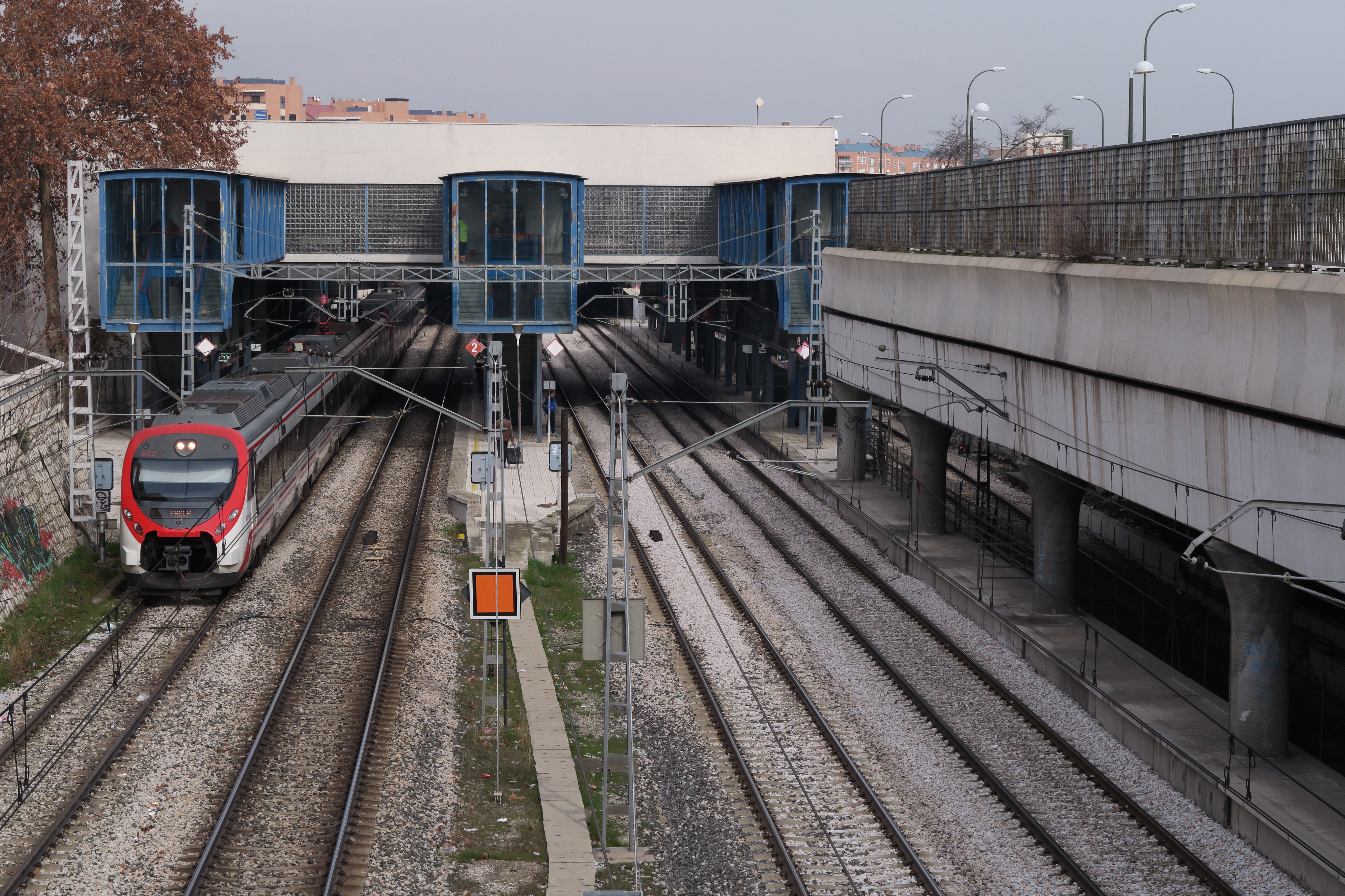 Estación de Villaverde Bajo (Madrid).